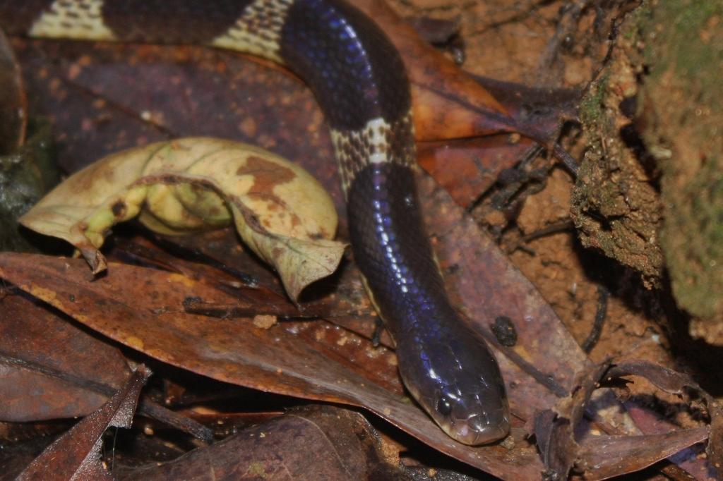 Many-banded Krait (Bungarus multicinctus), Taken at Tai Mo Shan.